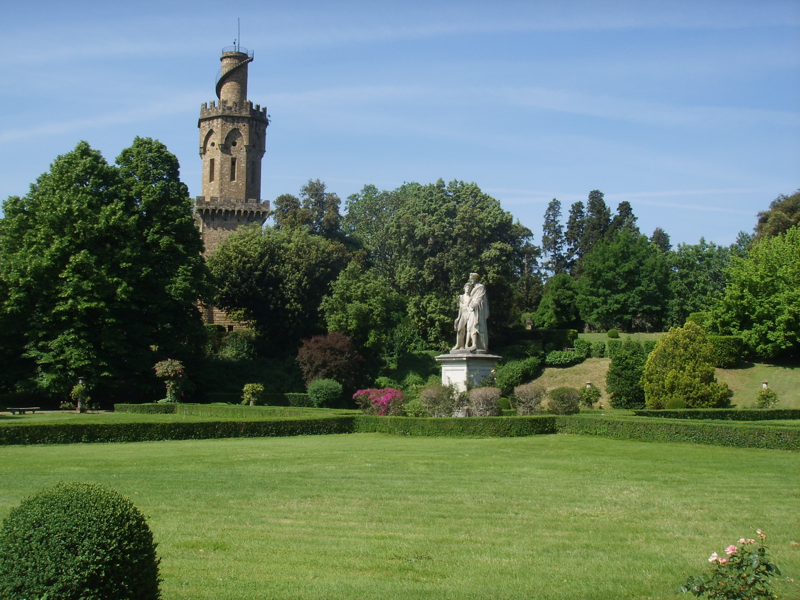 Giardino torrigiani,veduta